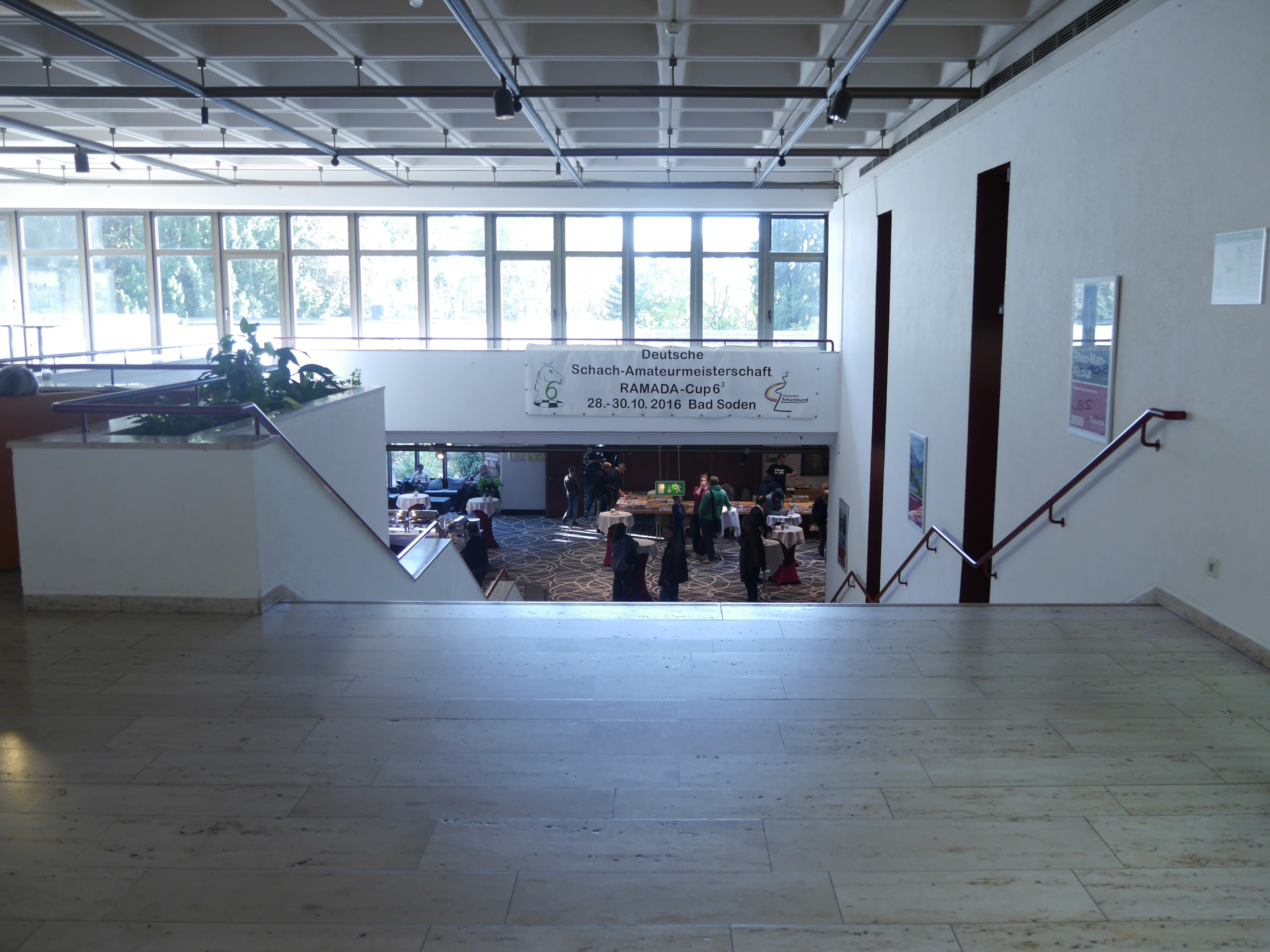 Ramada Hotel in Bad Soden, Treppenabgang von erster Etage (Ausstellung Meißener Porzellan) in das Erdgeschoss mit Ausgang zum Alten Kurpark und rechts zum Turniersaal, wo der Ramada Cup stattfand.